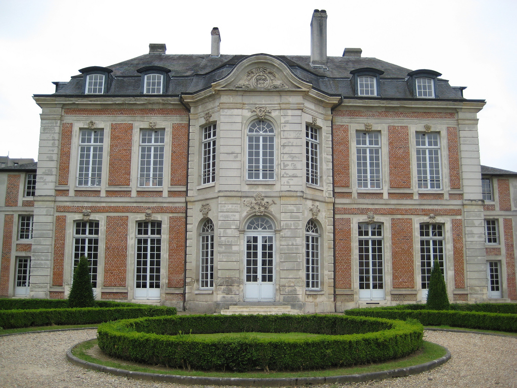 Le Palais du Haut-Doyenné de Lisieux, construit en 1769 pour le Haut-Doyen du chapitre de la cathédrale de Lisieux, abrite depuis 1985 l'école nationale de musique et de danse de Lisieux. Ici, la façade sur jardin.